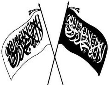 bendera